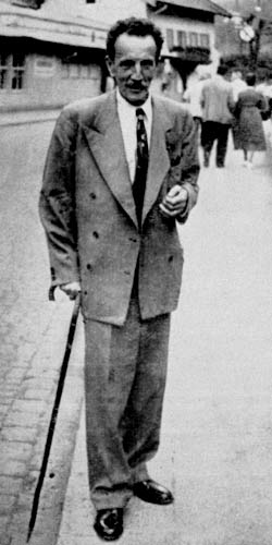 Sergey Melgunov